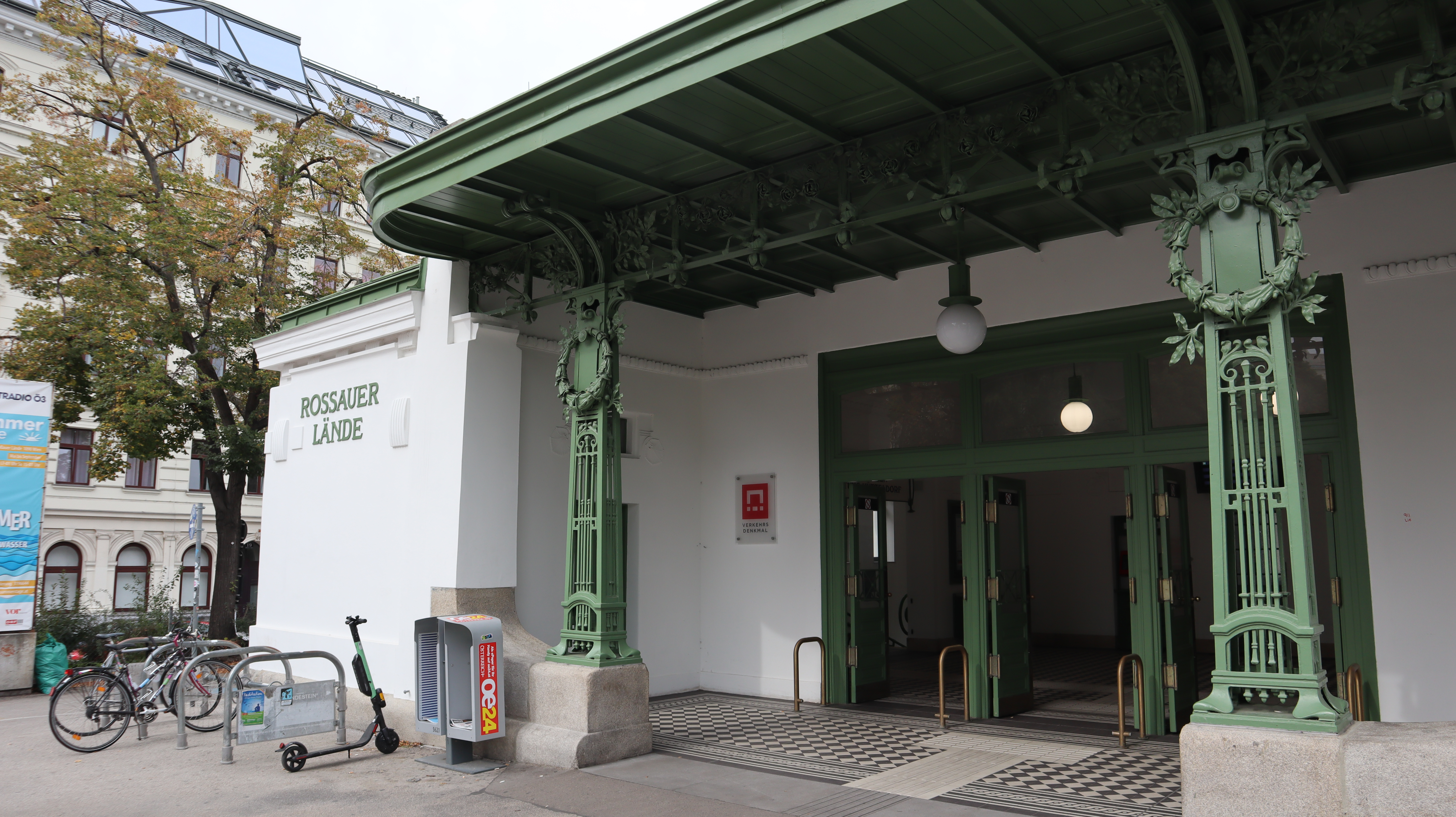 Bahnhof, Ehem. Stadtbahnstation Roßauer Lände